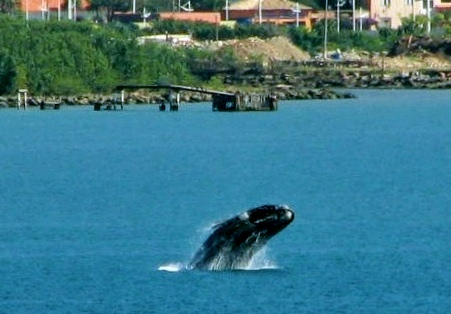 baleia perdida